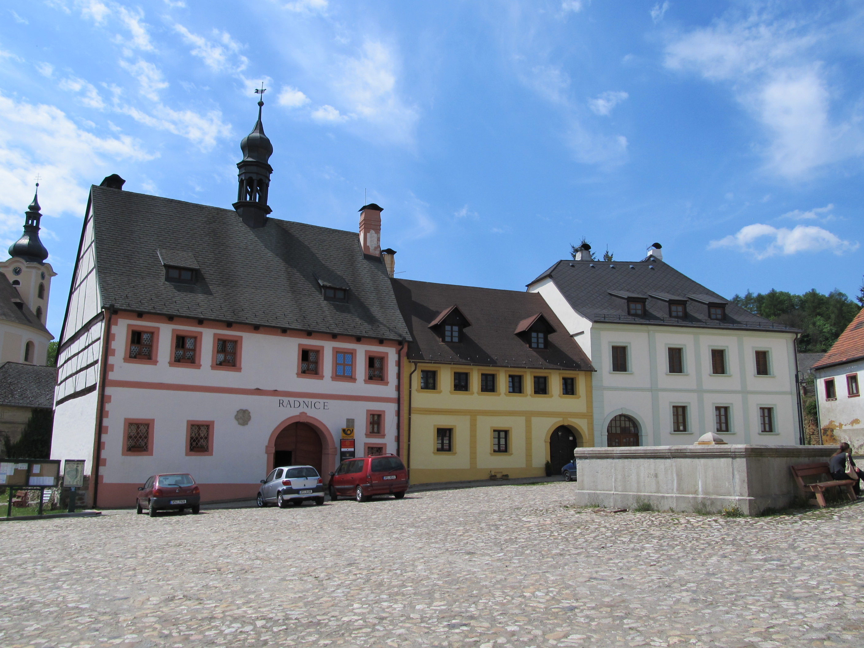 Úterý - radnice (č. 1) a domy č. 2 a 3